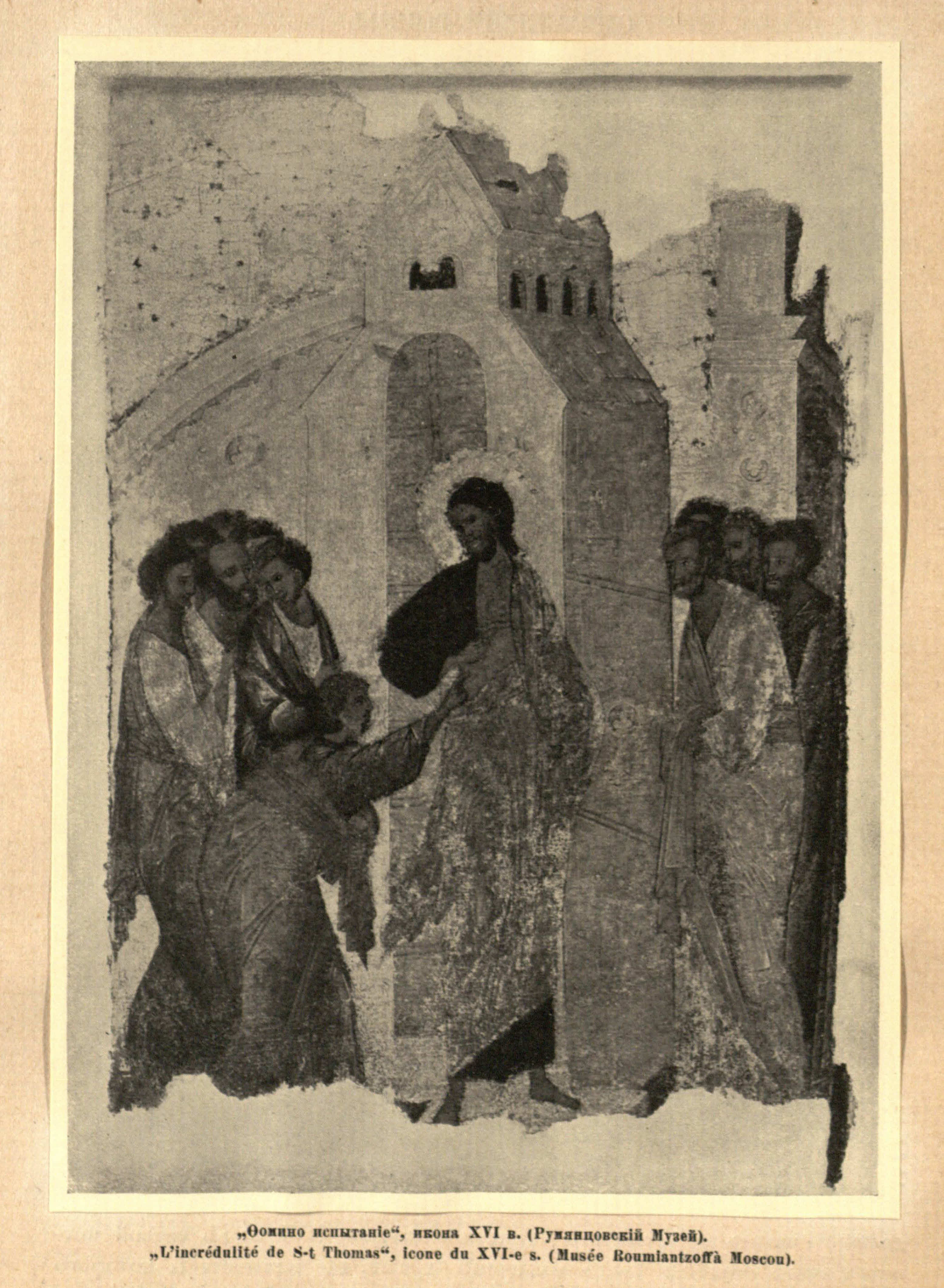 Репродукция иконы из статьи Эдинга Б. Н. Образ «Фомино испытание» в Румянцевском музее // Старые годы : журнал. — 1916. — Апрель — июнь. Состояние иконы до реставрации